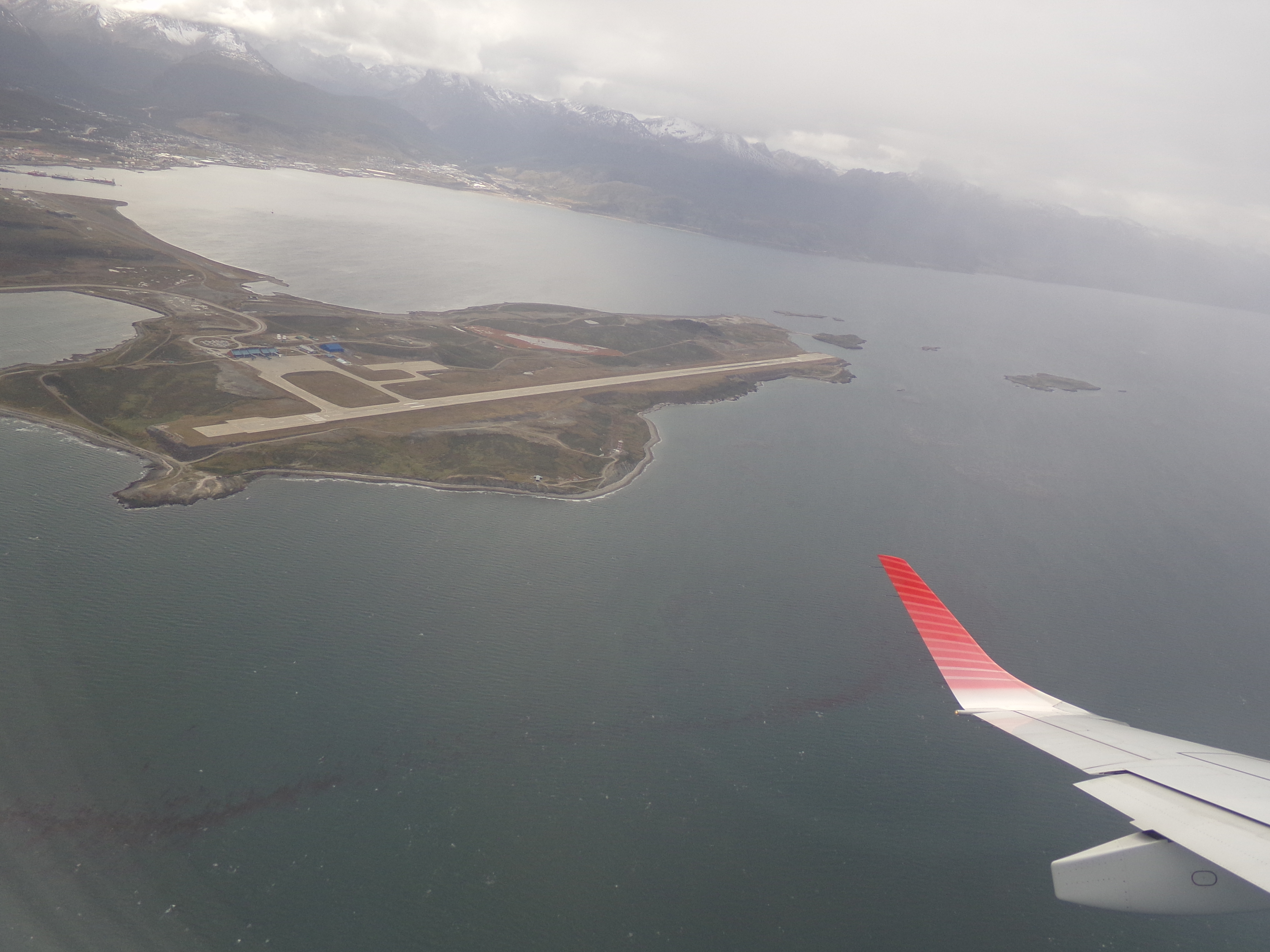 LV-CMA de Austral en el Aeropuerto de Ushuaia